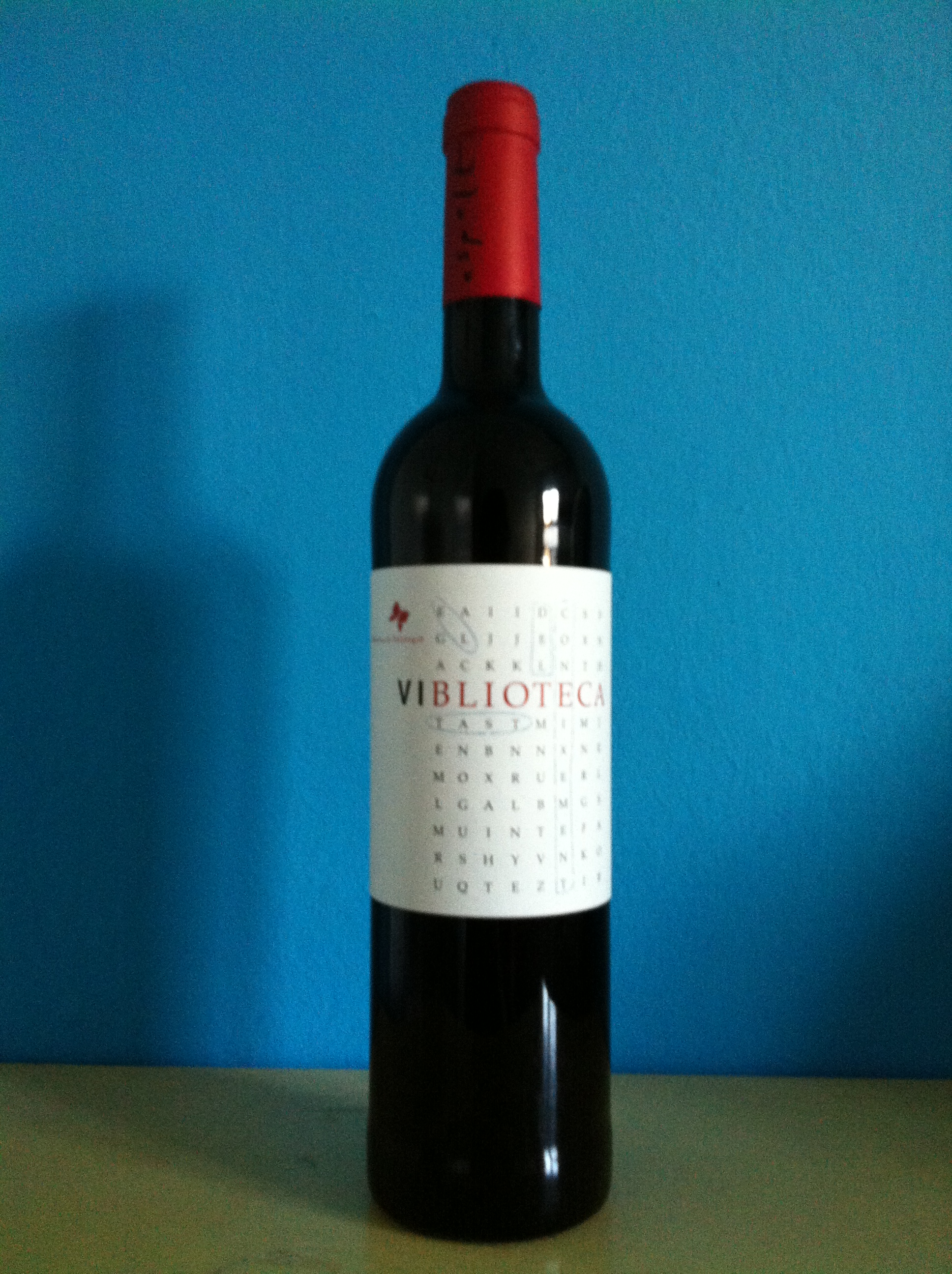 Viblioteca- Projecte de Vi de la Biblioteca de Palafrugell